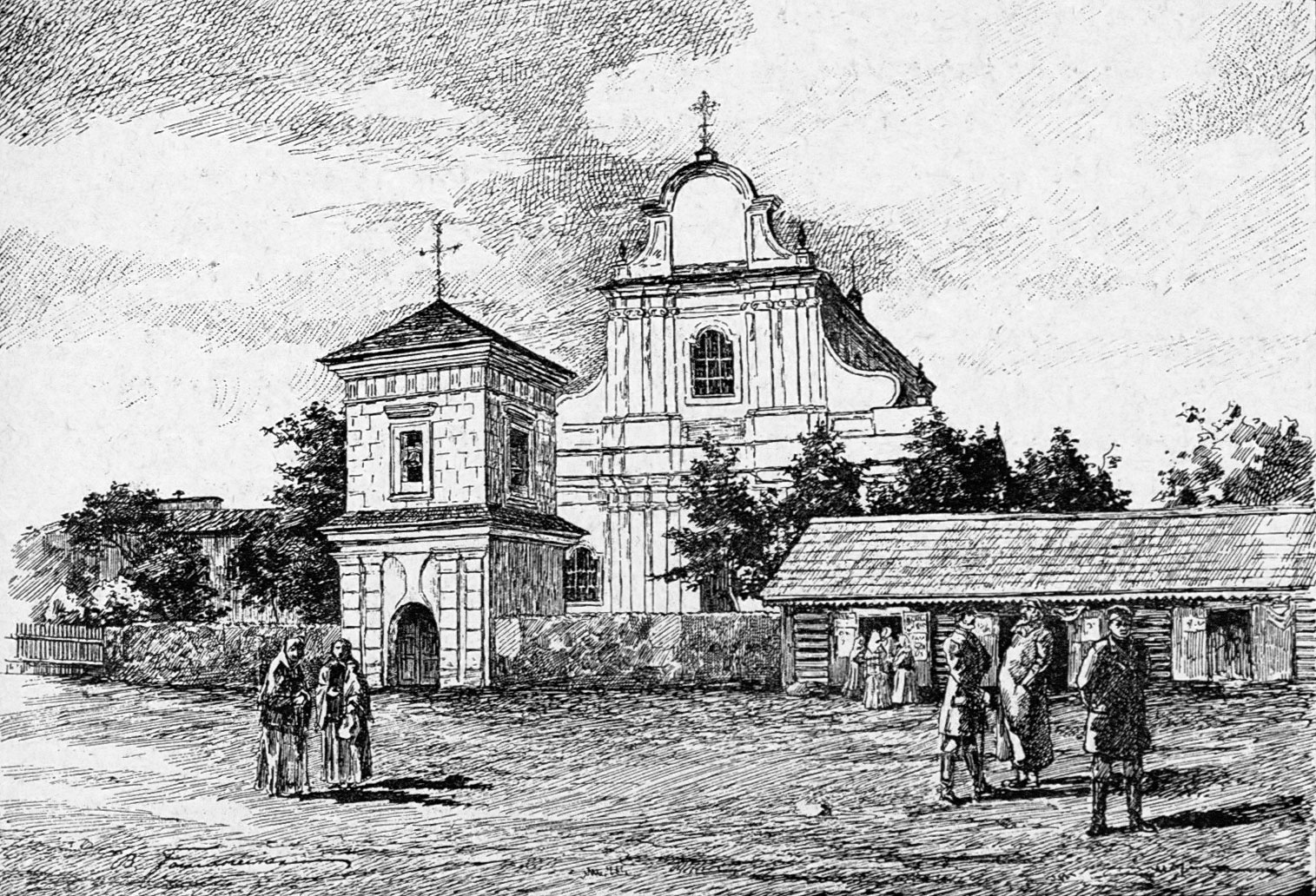 Беларуская (тарашкевіца): Гальшаны (Halšany), вуліца Трабская (vulica Trabskaja). Касьцёл